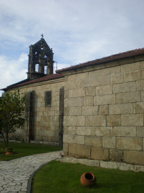 Igrexa de San Martiño en Moreira